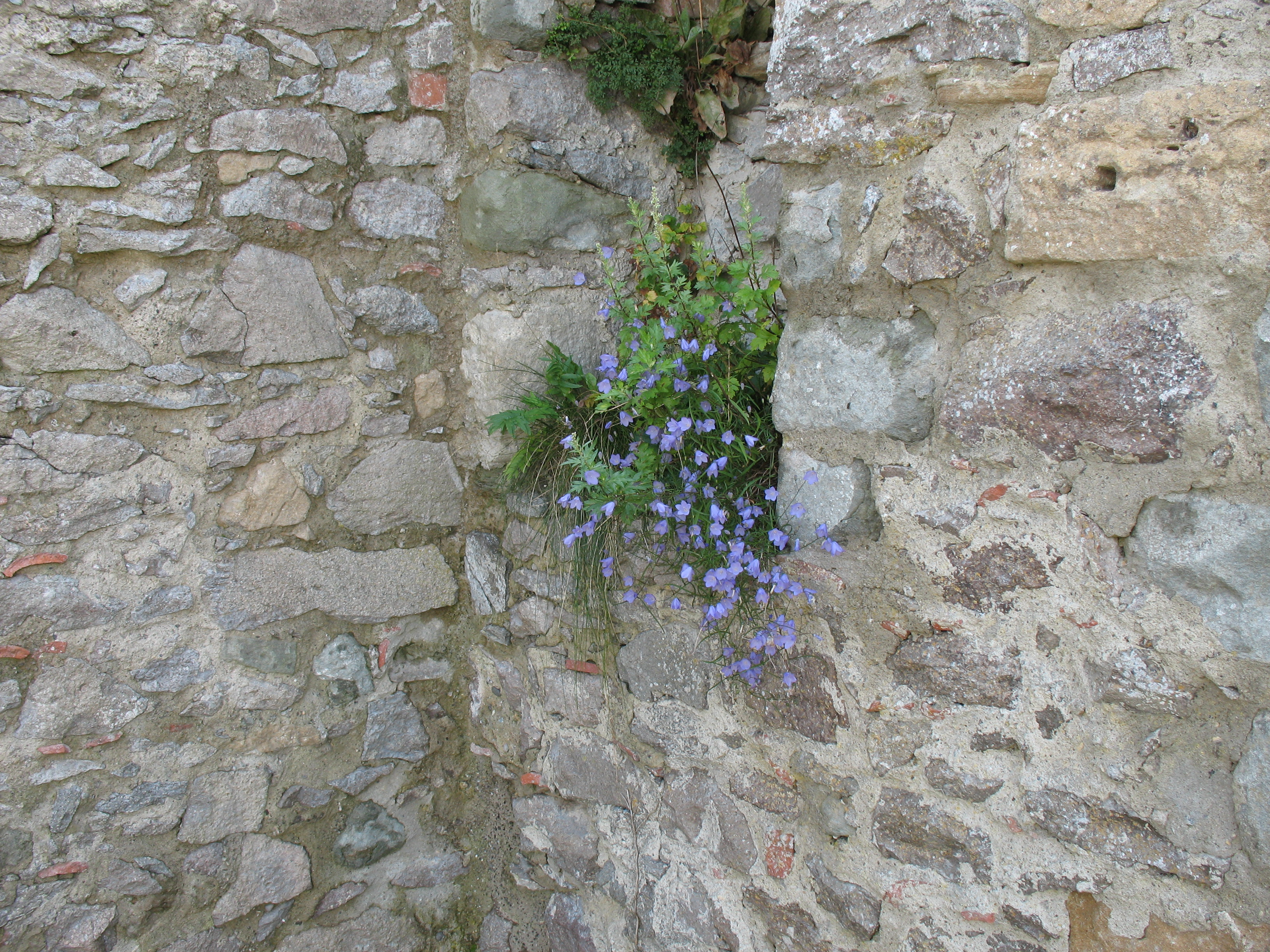 Pfirsichblättrige Glockenblumen (Campanula persicifolia) in den Ruinenmauern der Festung Hohentwiel